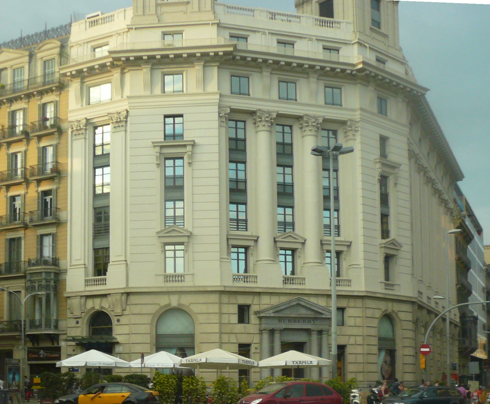 Antiga seu de l'empresa química Cros, al Passeig de Gràcia cantonada amb el carrer Aragó de Barcelona.